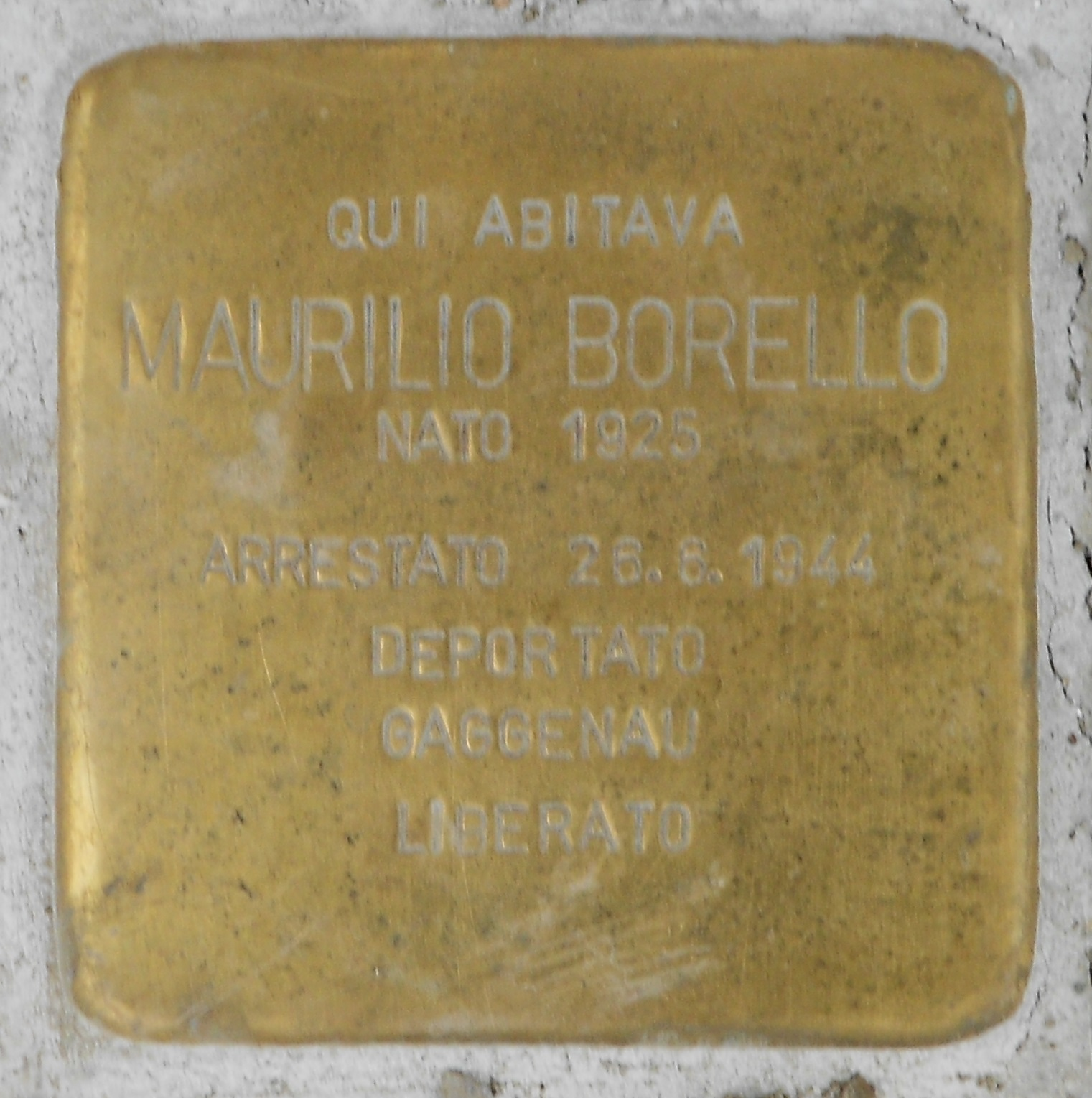 Pietra d'inciampo posata ad Avigliana per Maurilio Borello